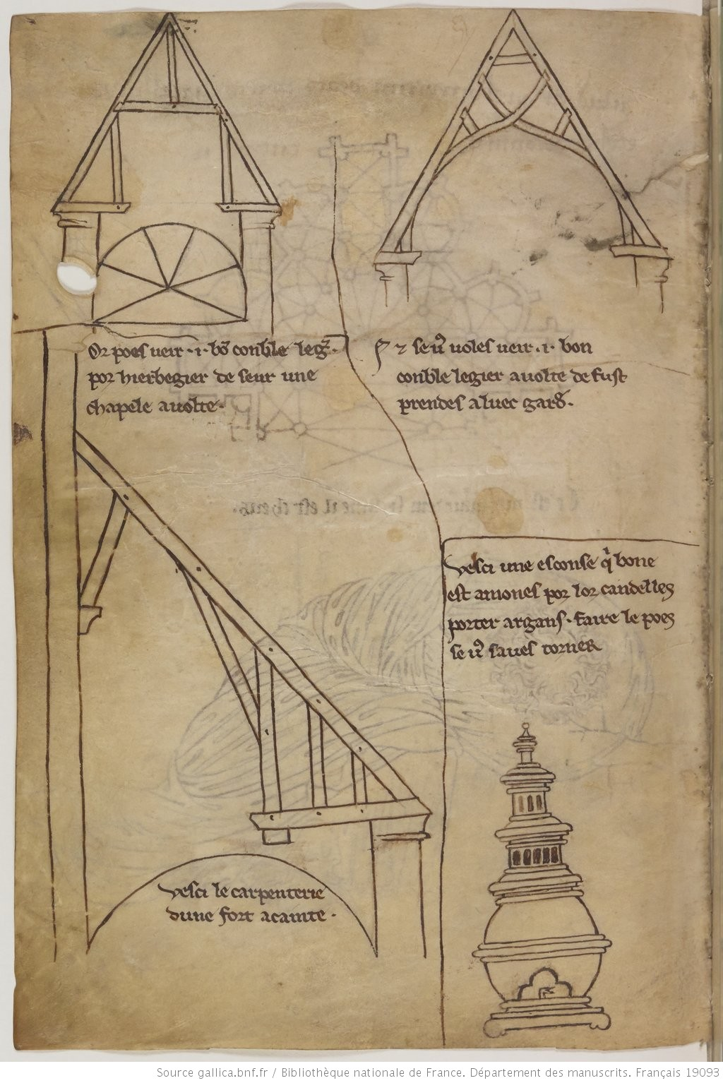 Modèle de charpente médieval dans le carnet Villard de Honnecourt